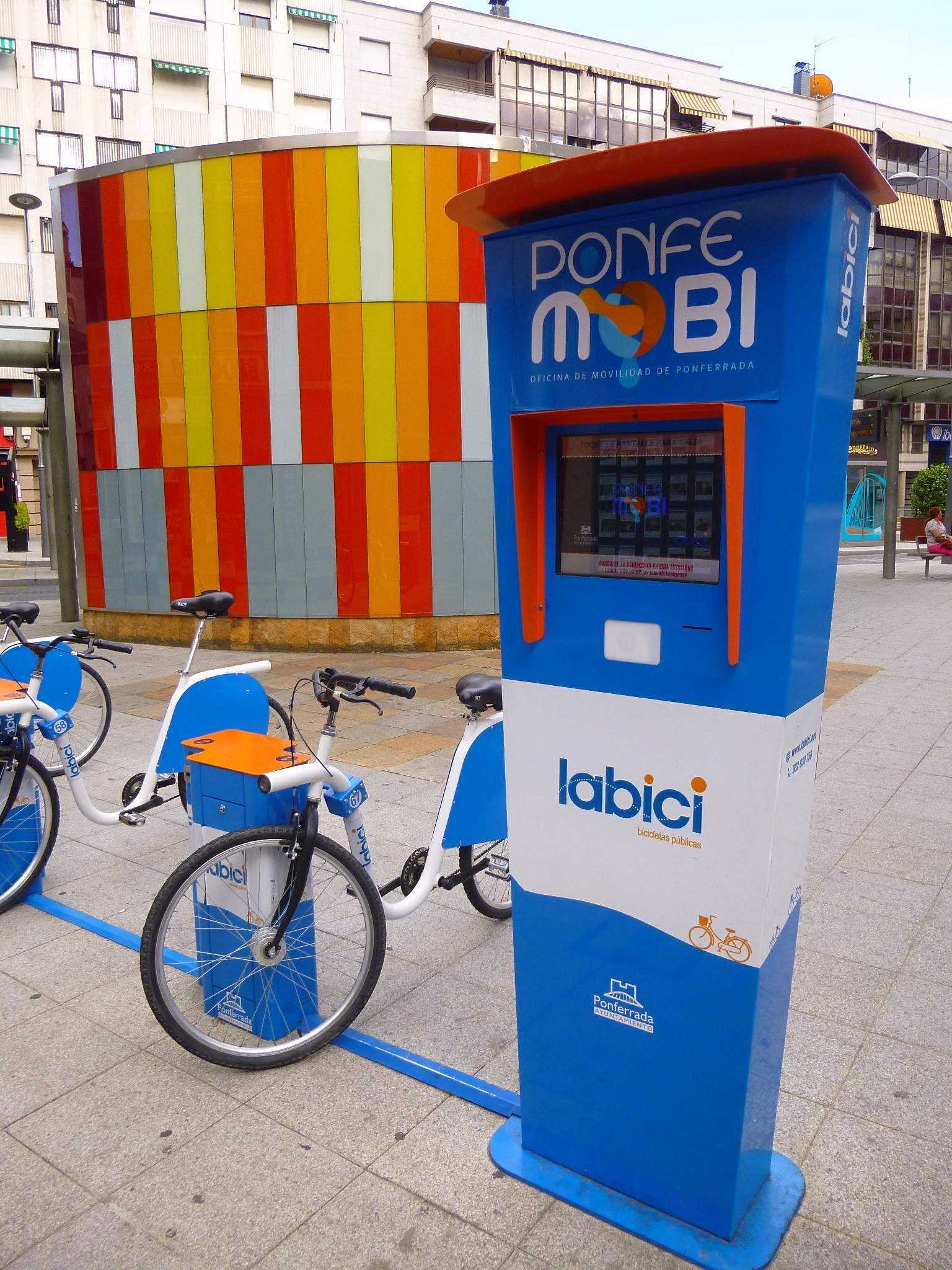 Ponferrada - Avenida de Compostela